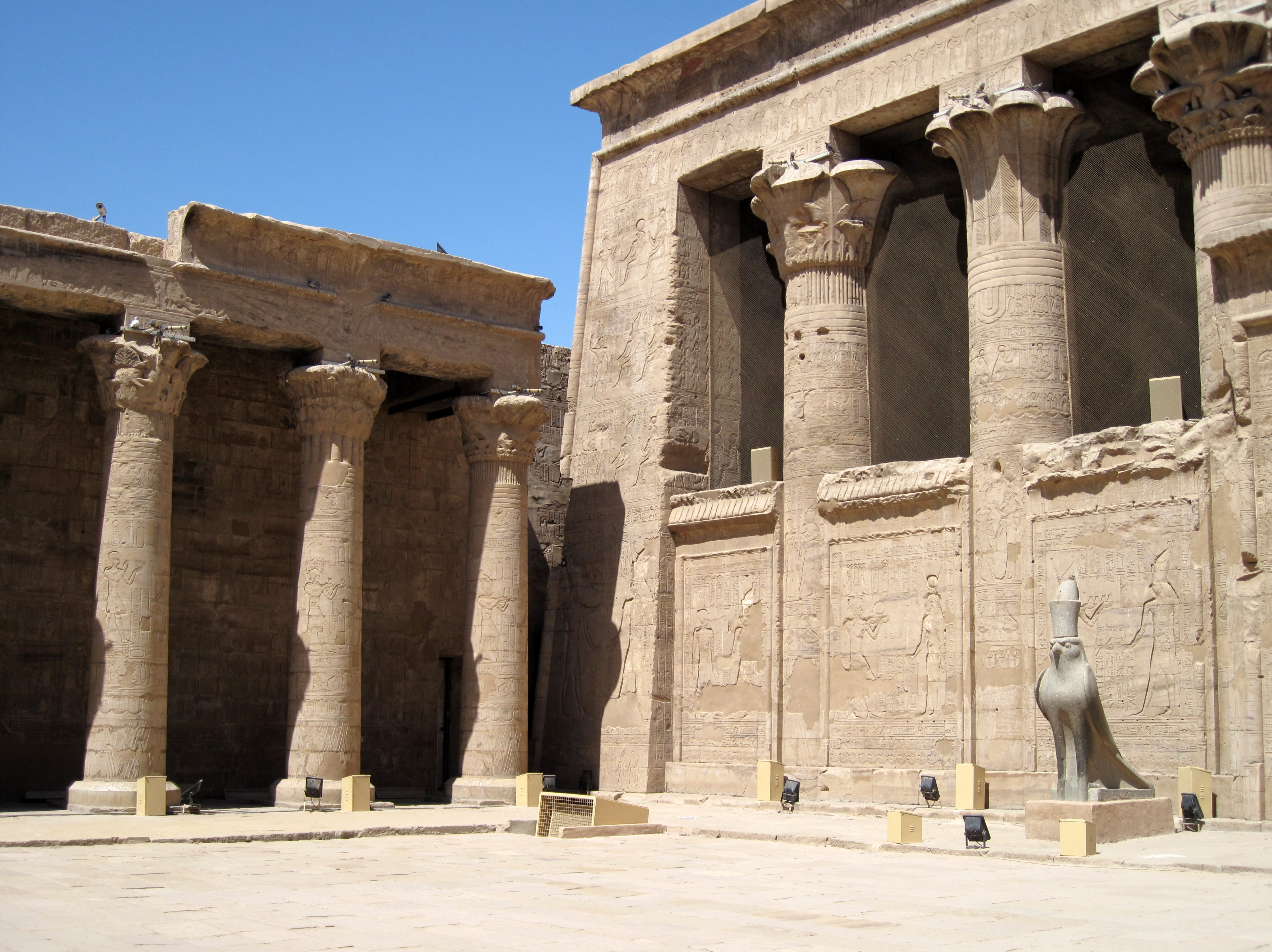 Westseite der Fassade des Pronaos im Tempel von Edfu, Ägypten